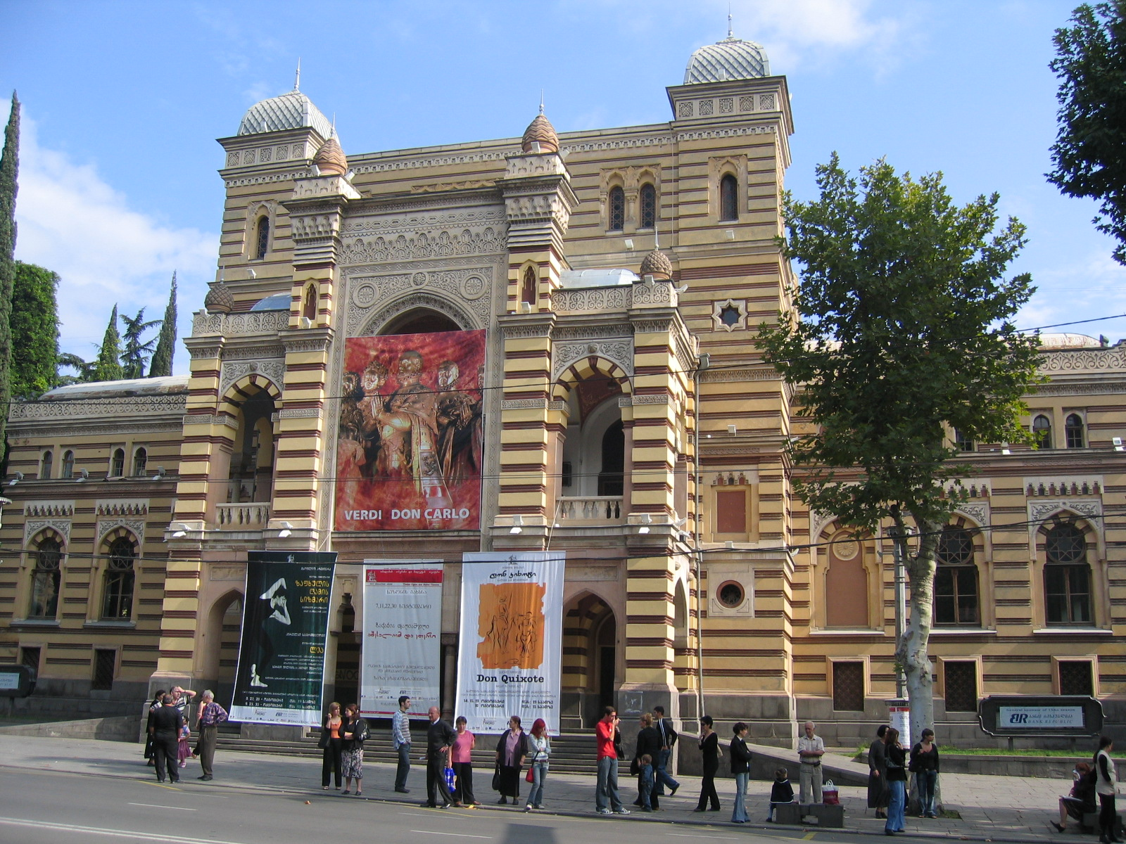 Opera House, Tbilisi, Georgia (Teatr opery i baleta im. Zakaria Paliashvili)